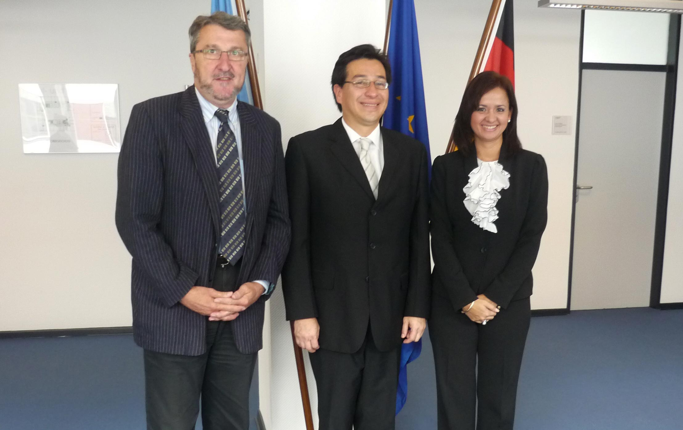 19 de junio de 2009